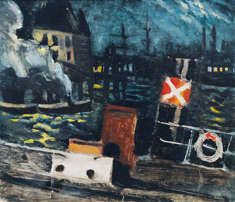 Schlepper im Hamburger Hafen bei Nacht. Öl/Holz, 28 x 32 cm